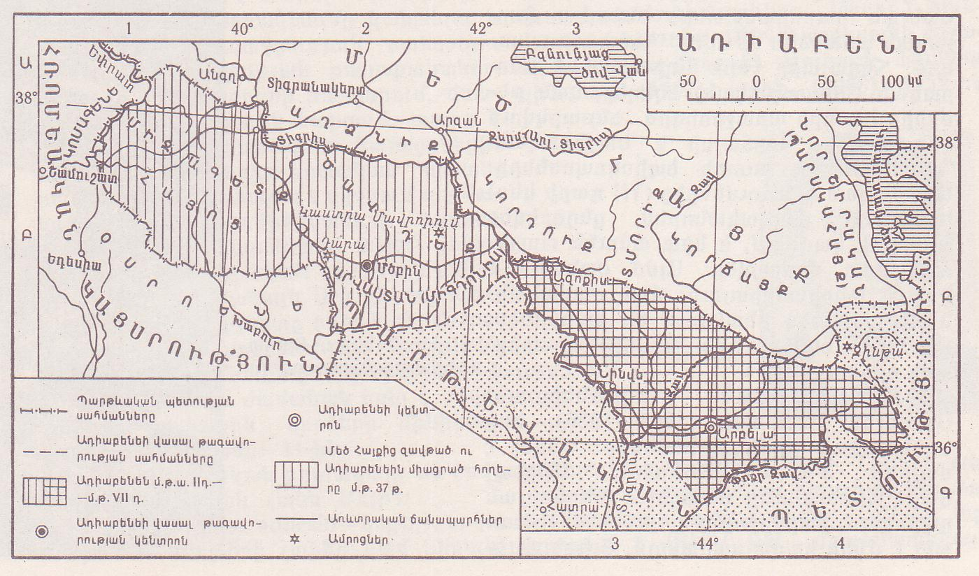 Ադիաբենեի Թագավորություն